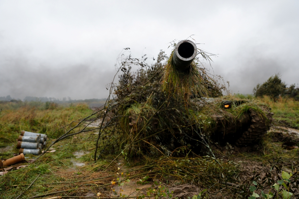 Сухопутные подразделения Балтийского флота выполнили боевые стрельбы в рамках ССУ «Запад-2017».